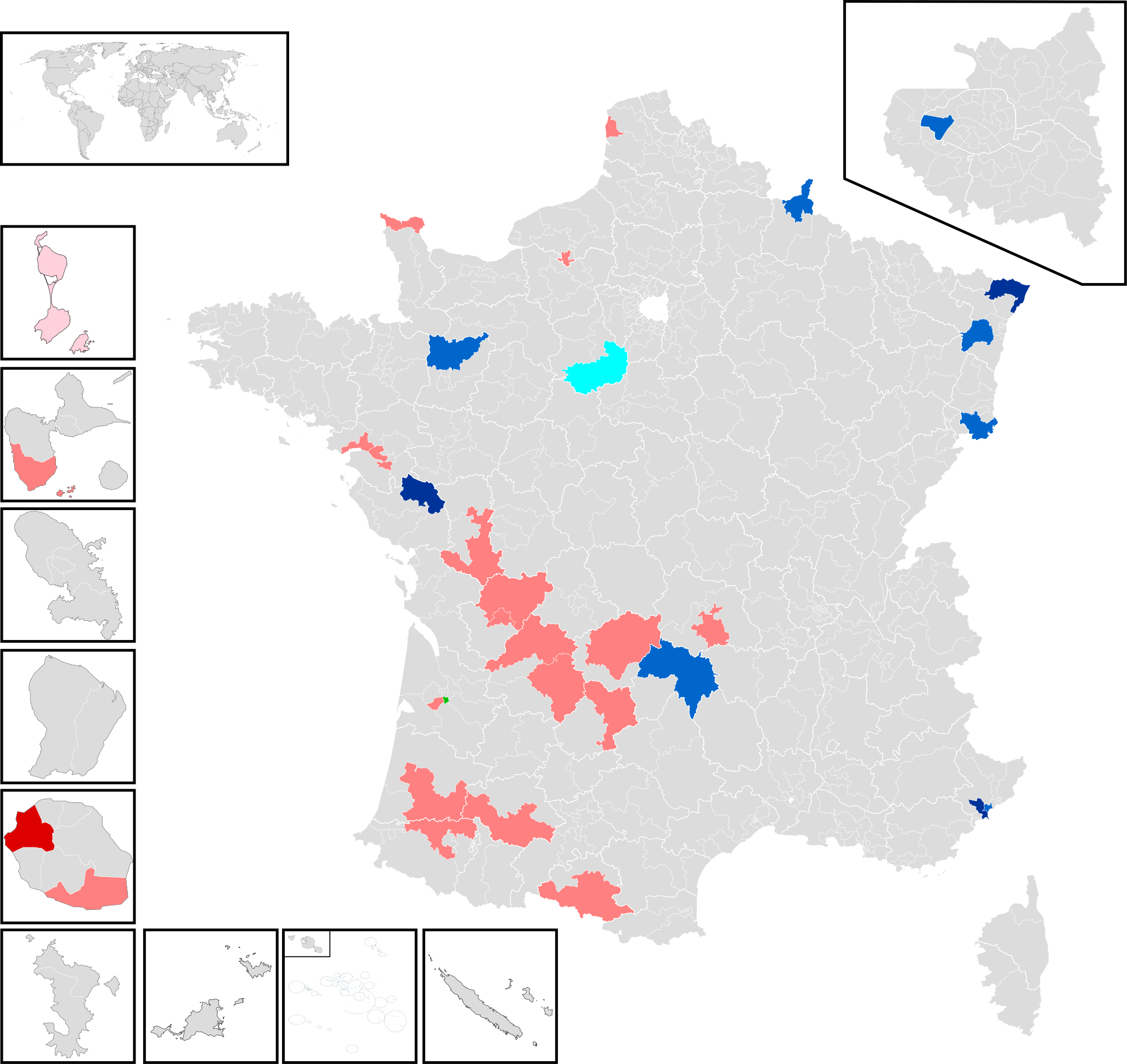 Législatives 2012 - Élus au 1er tour